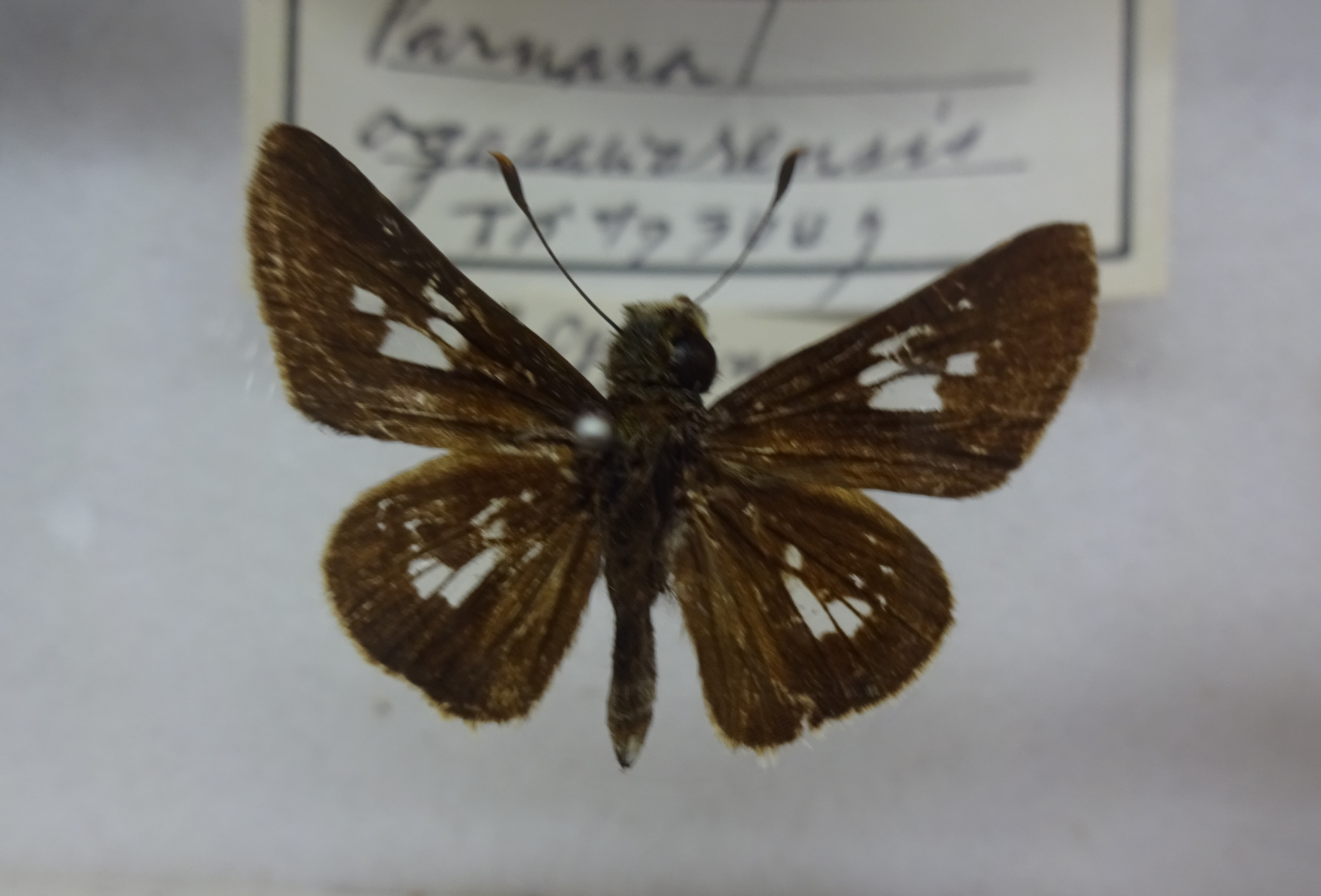 オガサワラセセリ